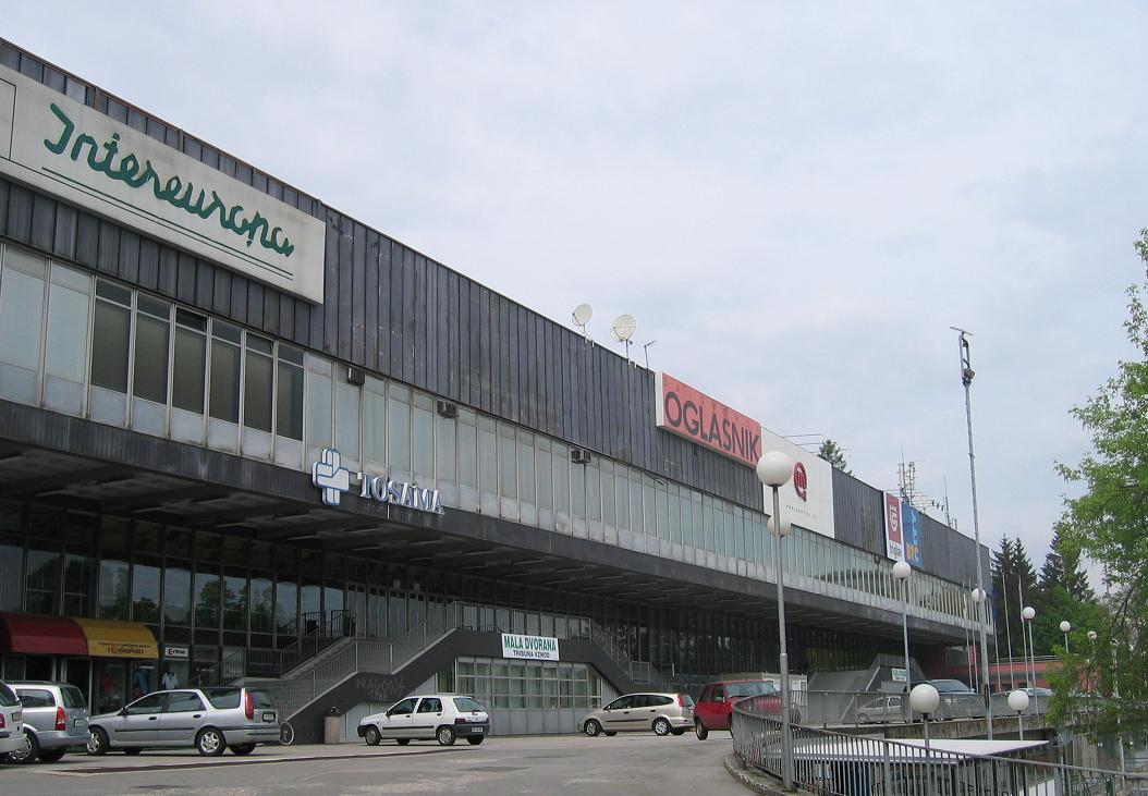 Hala Tivoli, Ljubljana photo:Ziga 16:17, 3 May 2006 (UTC)